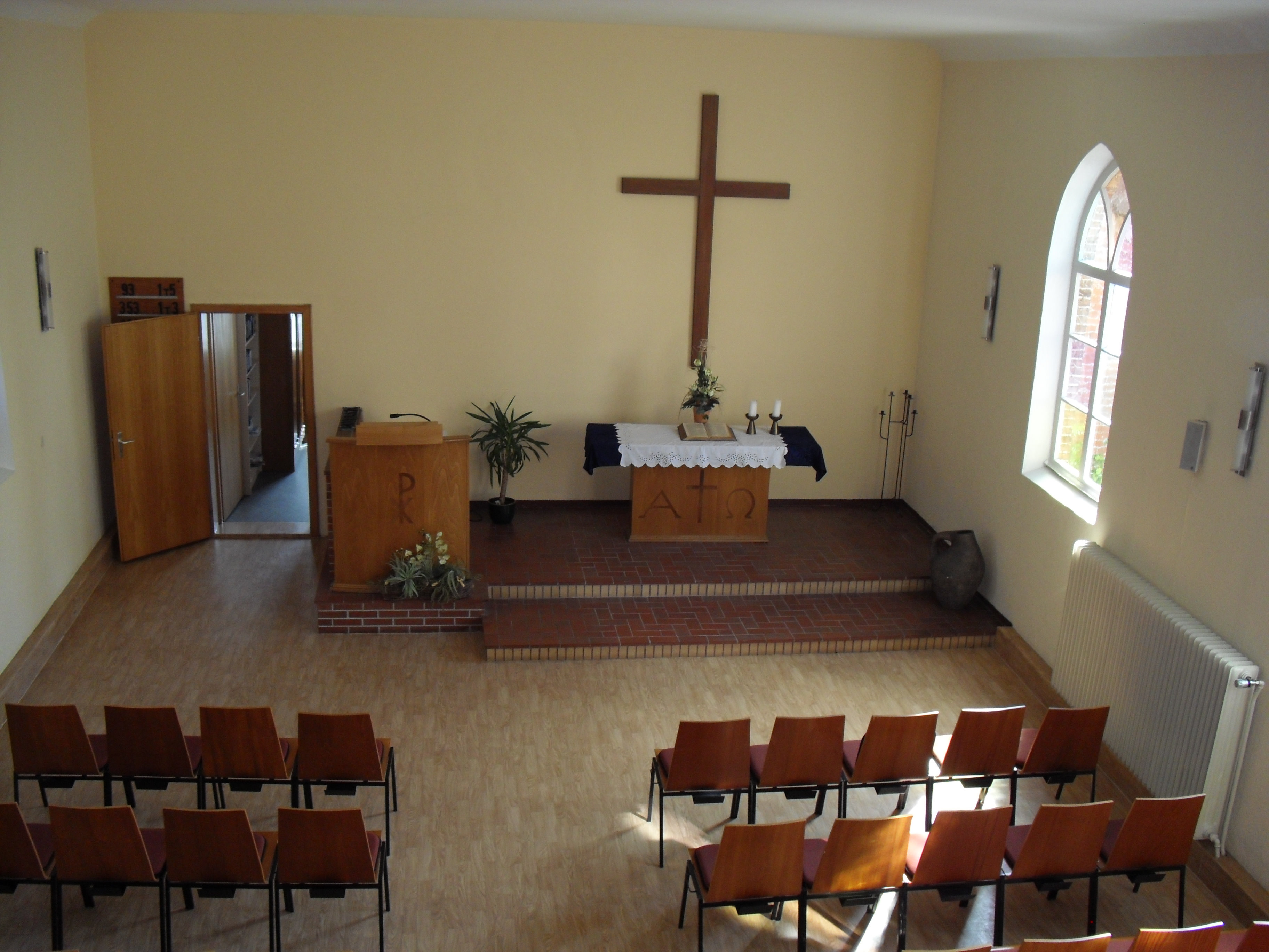 Innenraum der Methodistenkirche in Aurich